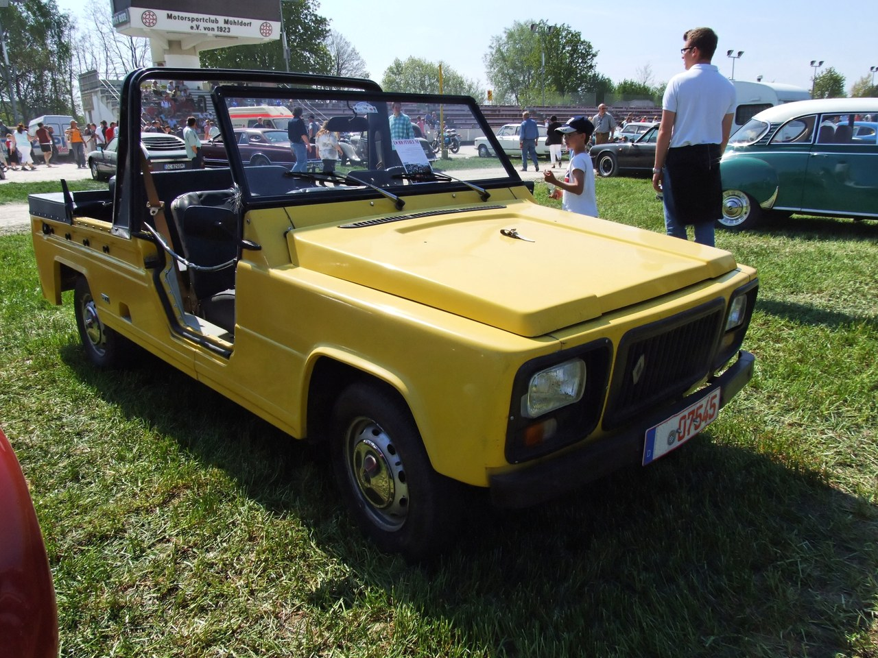 Renault Rodeo 6 Quelle: selbst fotografiert, 04/2007 Fotograf: Späth Chr.